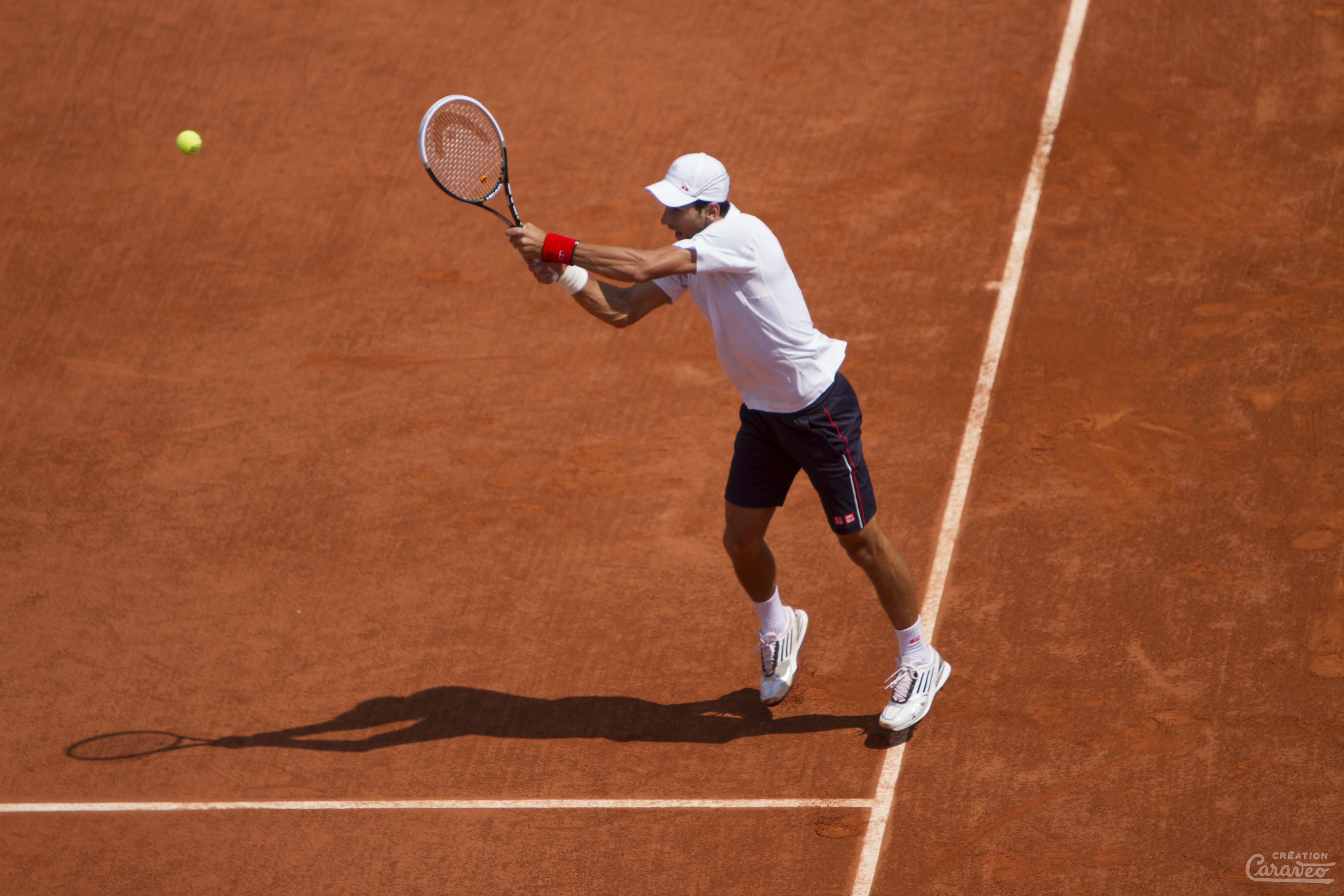 Novak Đoković, Roland-Garros 2012.